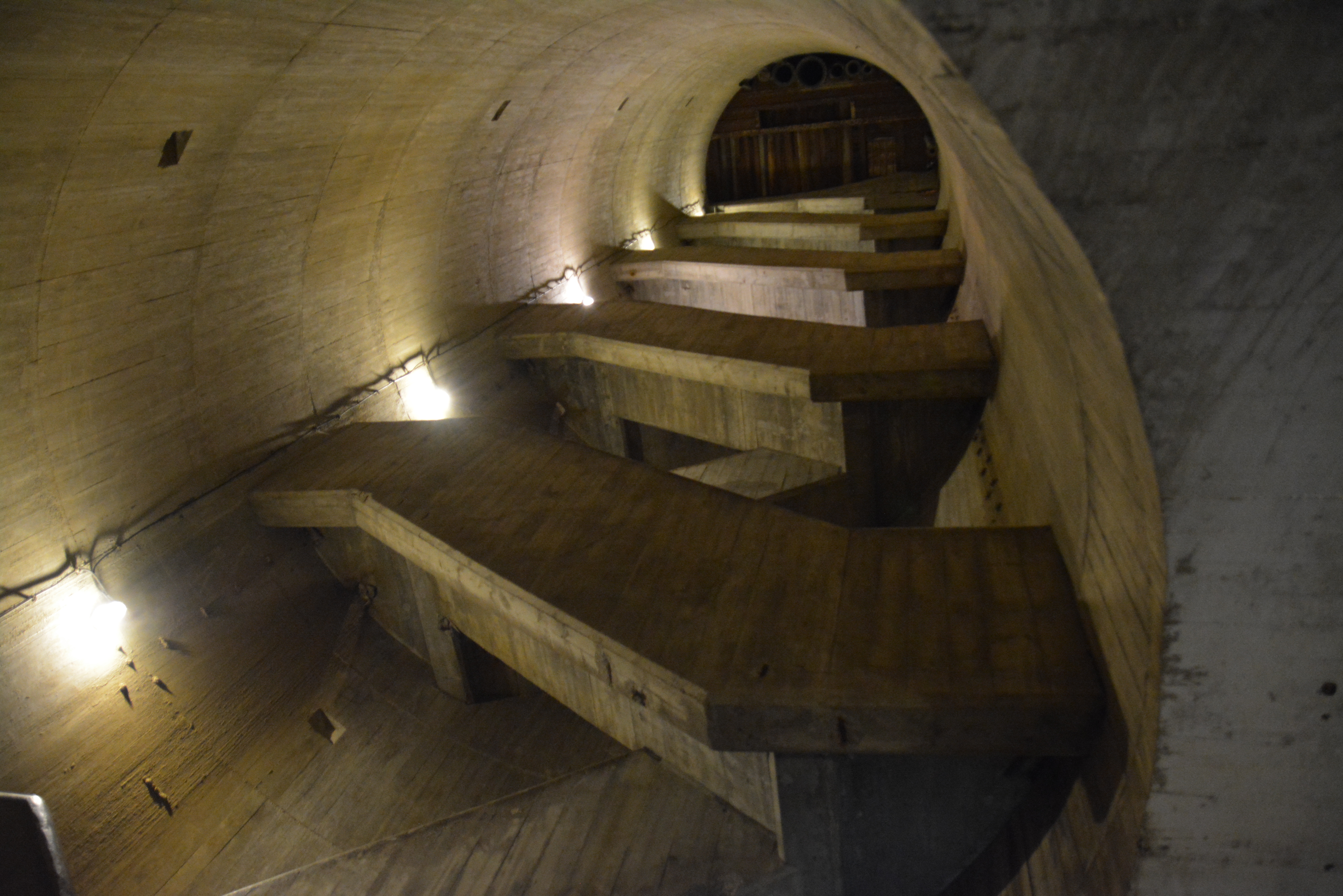 MRU - Muzeum Fortyfikacji i Nietoperzy w Pniewie